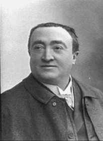 José Dupuis aux Variétés (cliché Nadar)